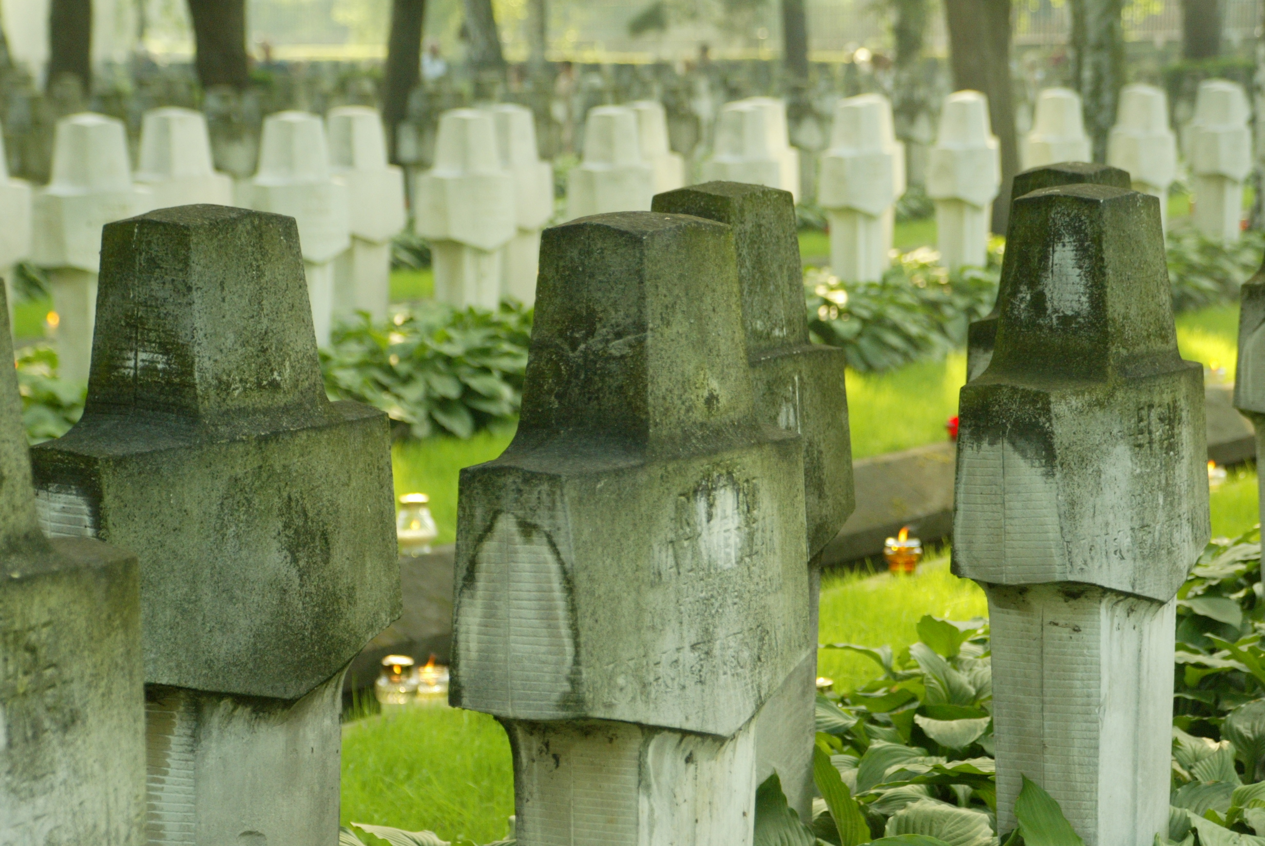 Kwatera Powstańców Warszawskich na Cmentarzu Komunalnym (d. Wojskowym) na warszawskich Powązkach